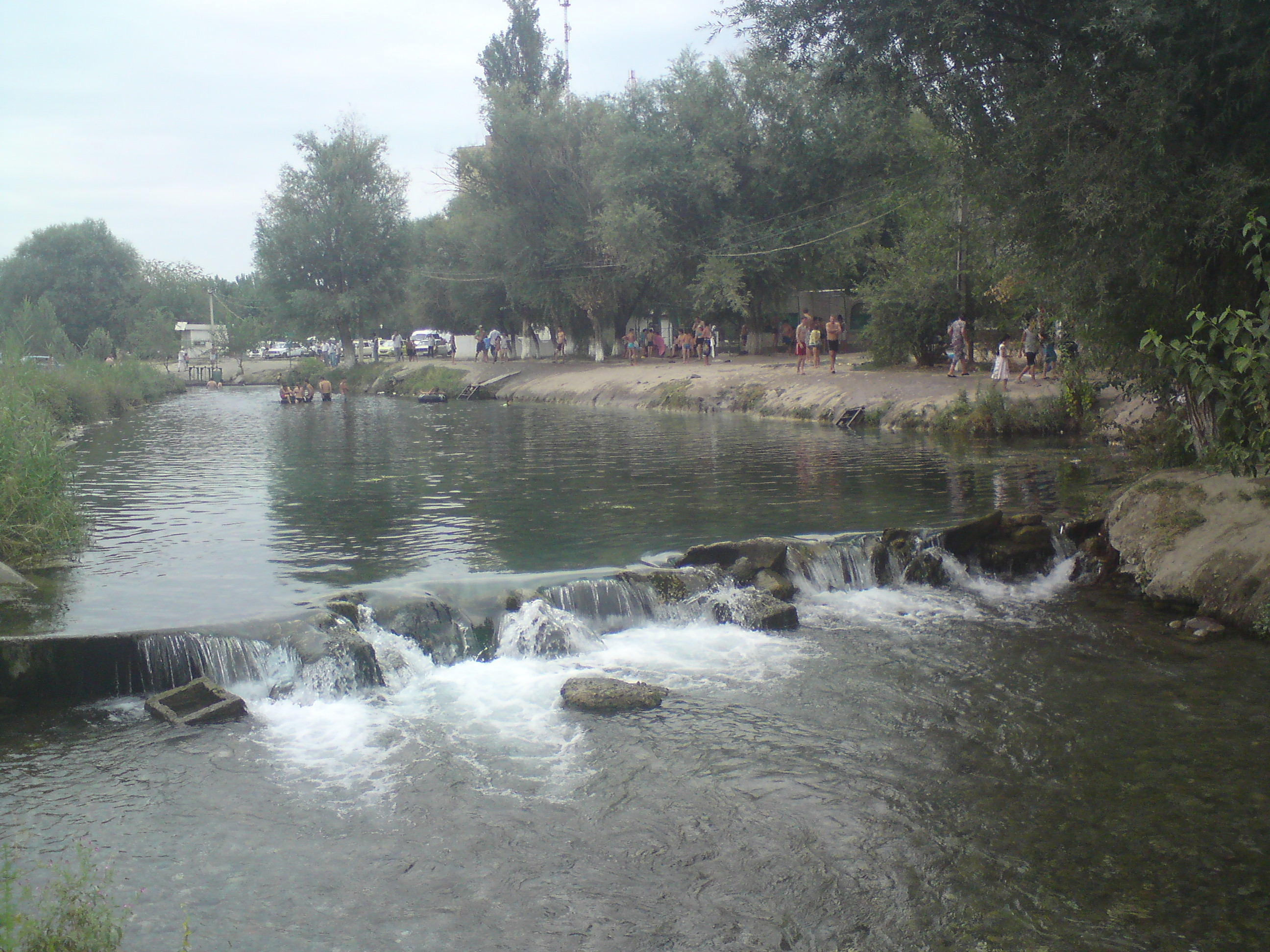 Канал (арык) Кичкина-Карасу, проток канала Карасу (Правобережный), посёлок Геофизика, Ташкентский вилоят